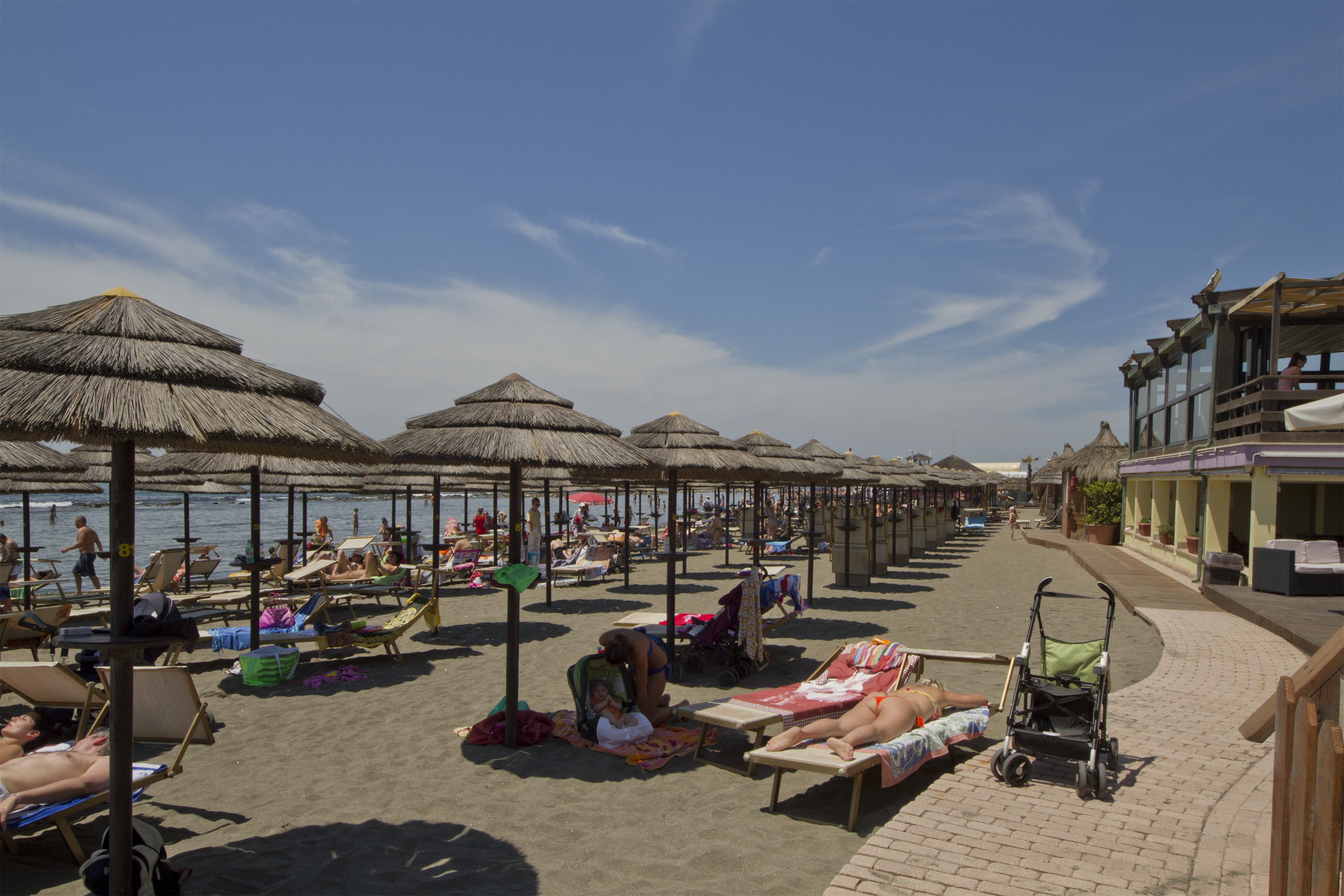 Faber Village, Lido di Ostia RM, Lazio, Italy